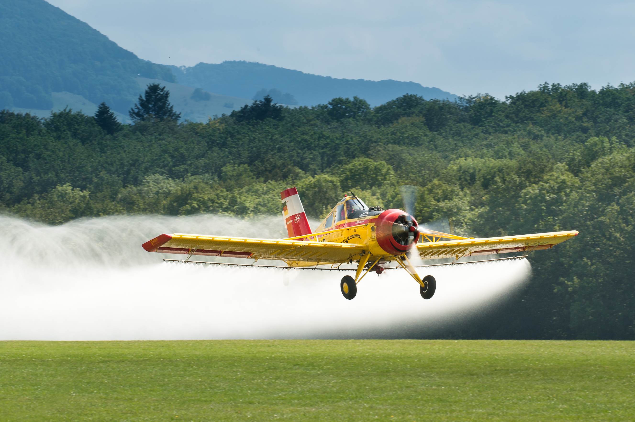 Agrarflieger Gehling PLZ-106 AR Kruk beim Oldtimer Fliegertreffen Flugfeld Hahnweide 2013